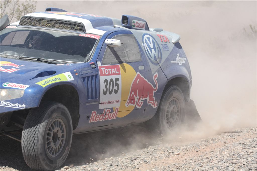 Rally Dakar 2009, etapa 4 Jacobacci Neuquén. Auto ganador de la competencia: DE VILLIERS (ZAF) / VON ZITZEWITZ (DEU) VOLKSWAGEN